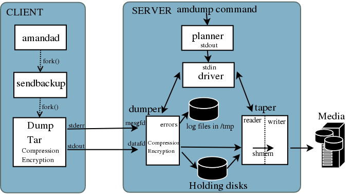 Esquema de la arquitectura cliente-servidor de Amanda